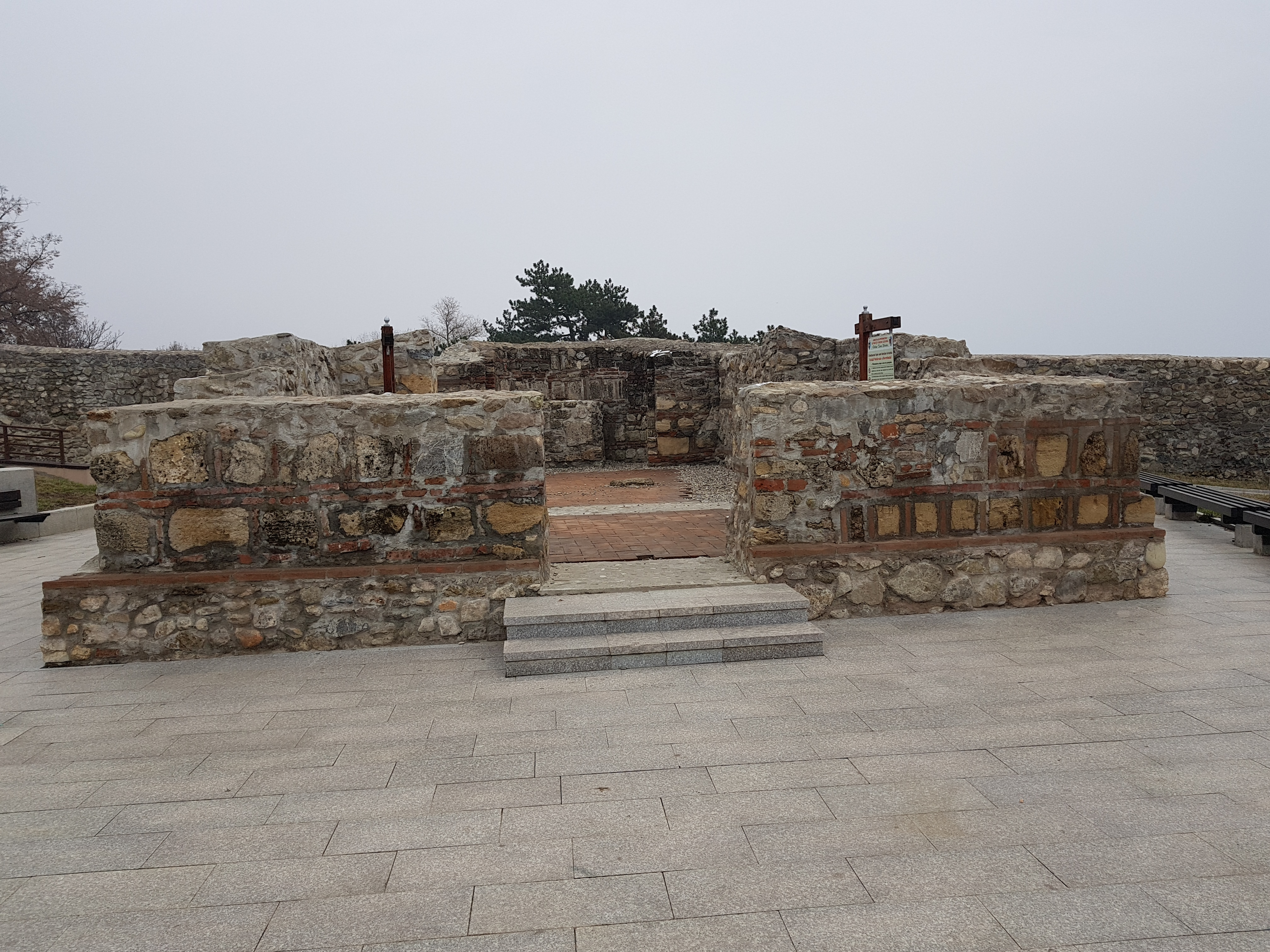 Ruina capelei 02